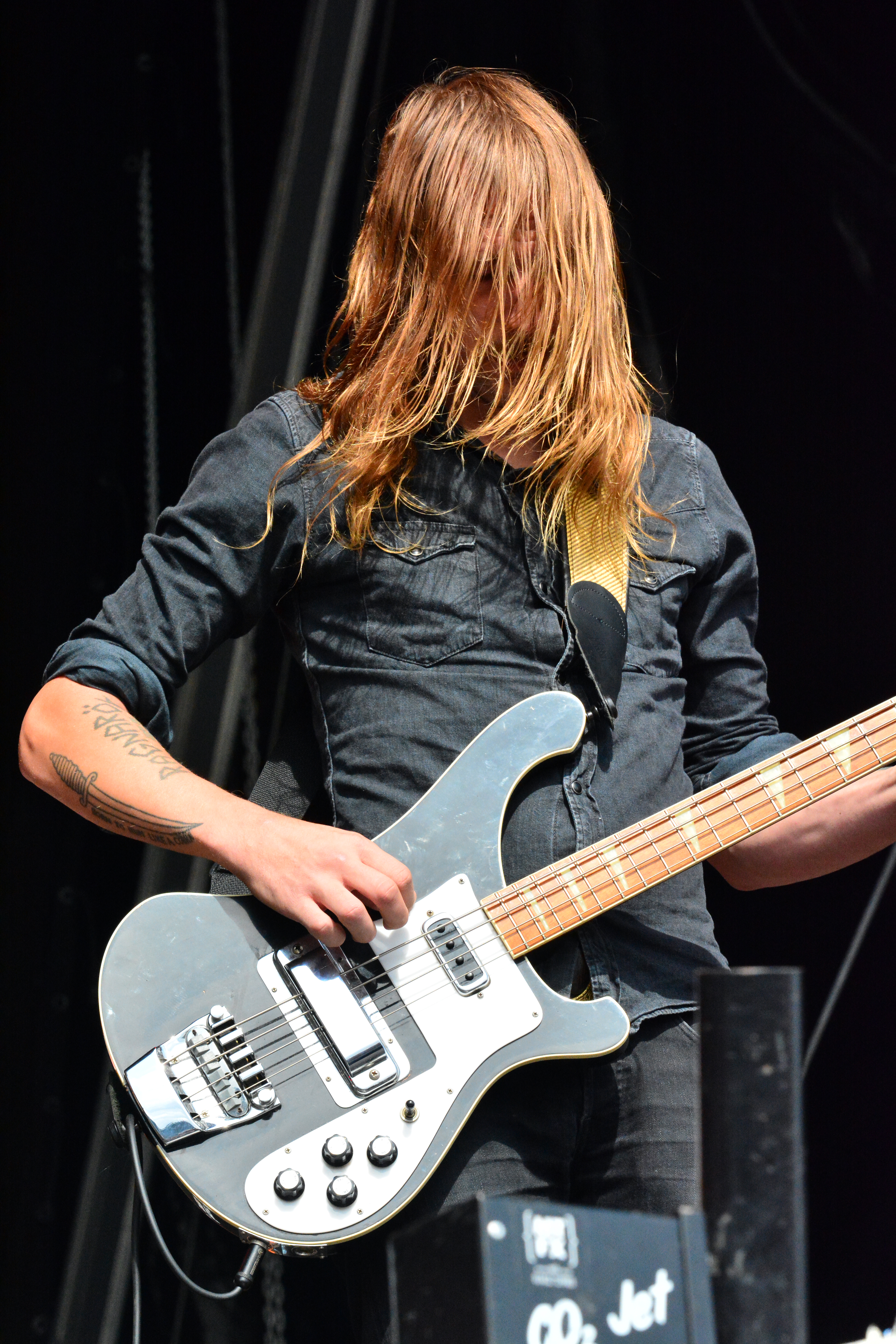 Rikard Edlund von Graveyard beim Elbriot 2014